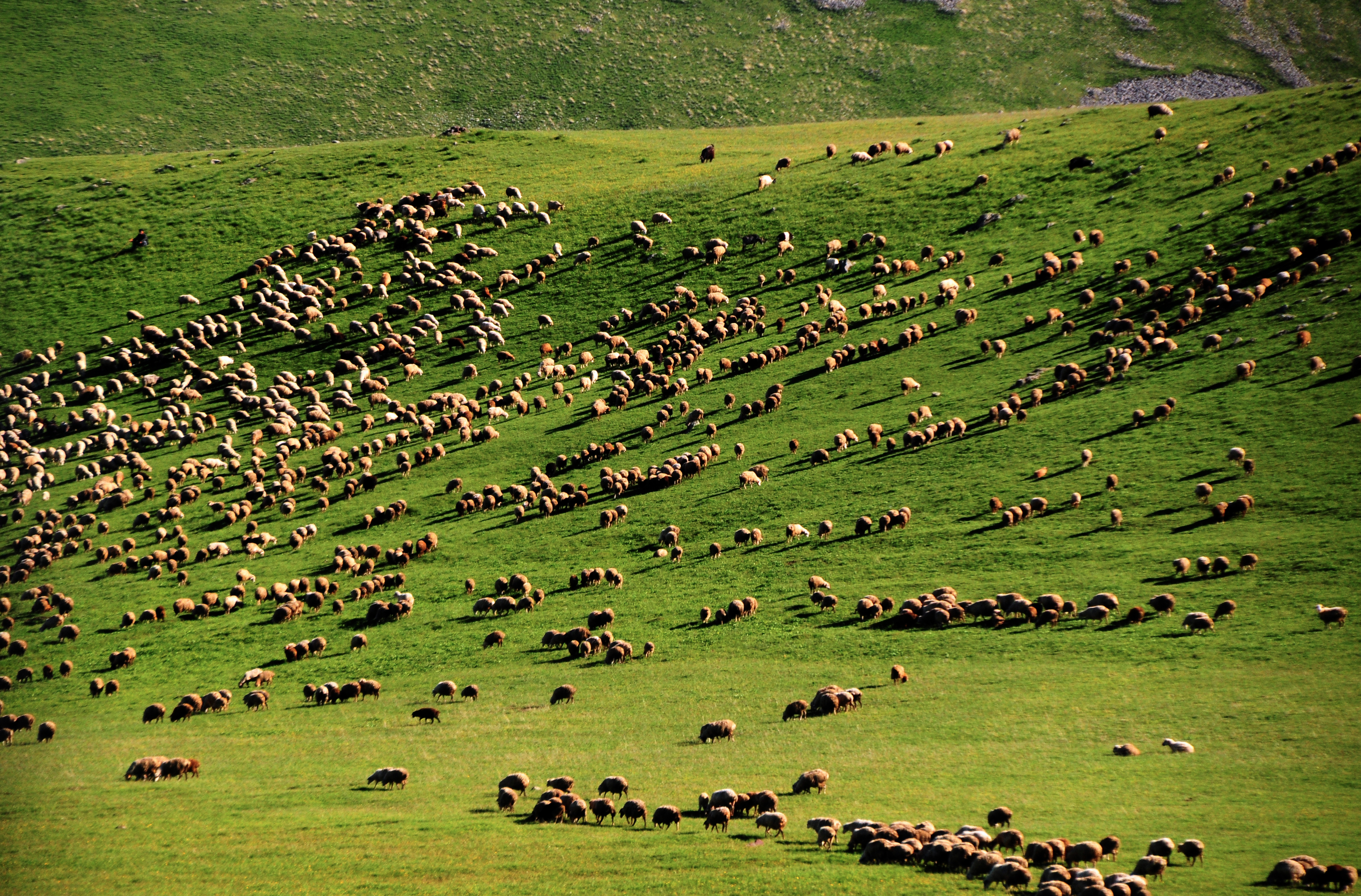 18637 Paravani